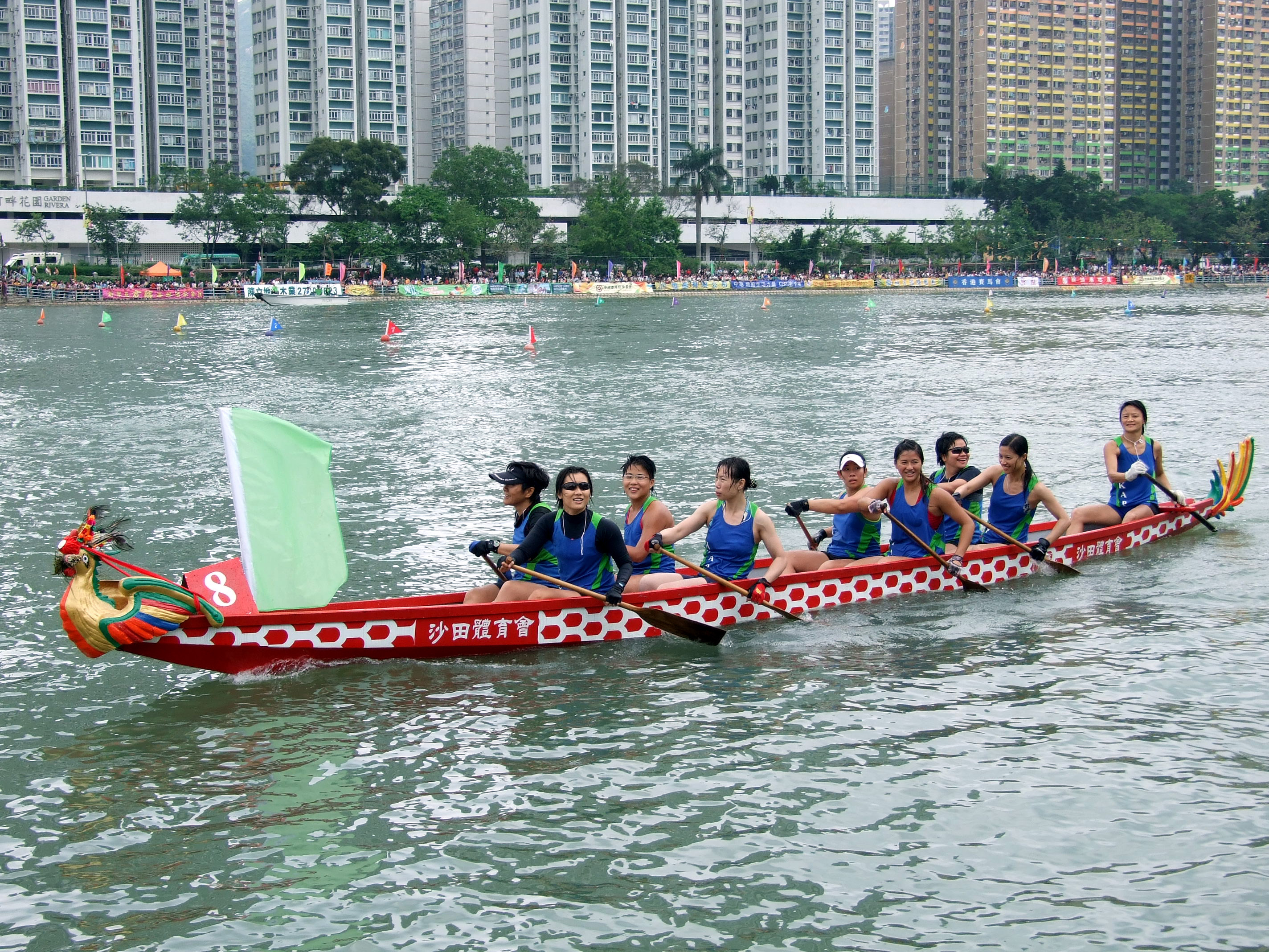 中文（香港）: 沙田龍舟競賽女子鳳艇